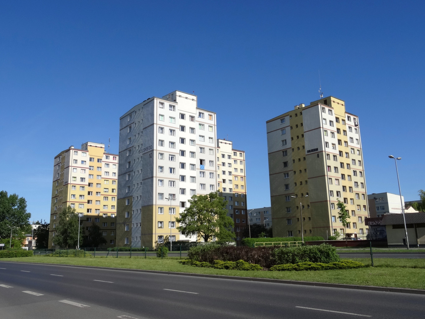 Osiedle Szwederowo w Bydgoszczy